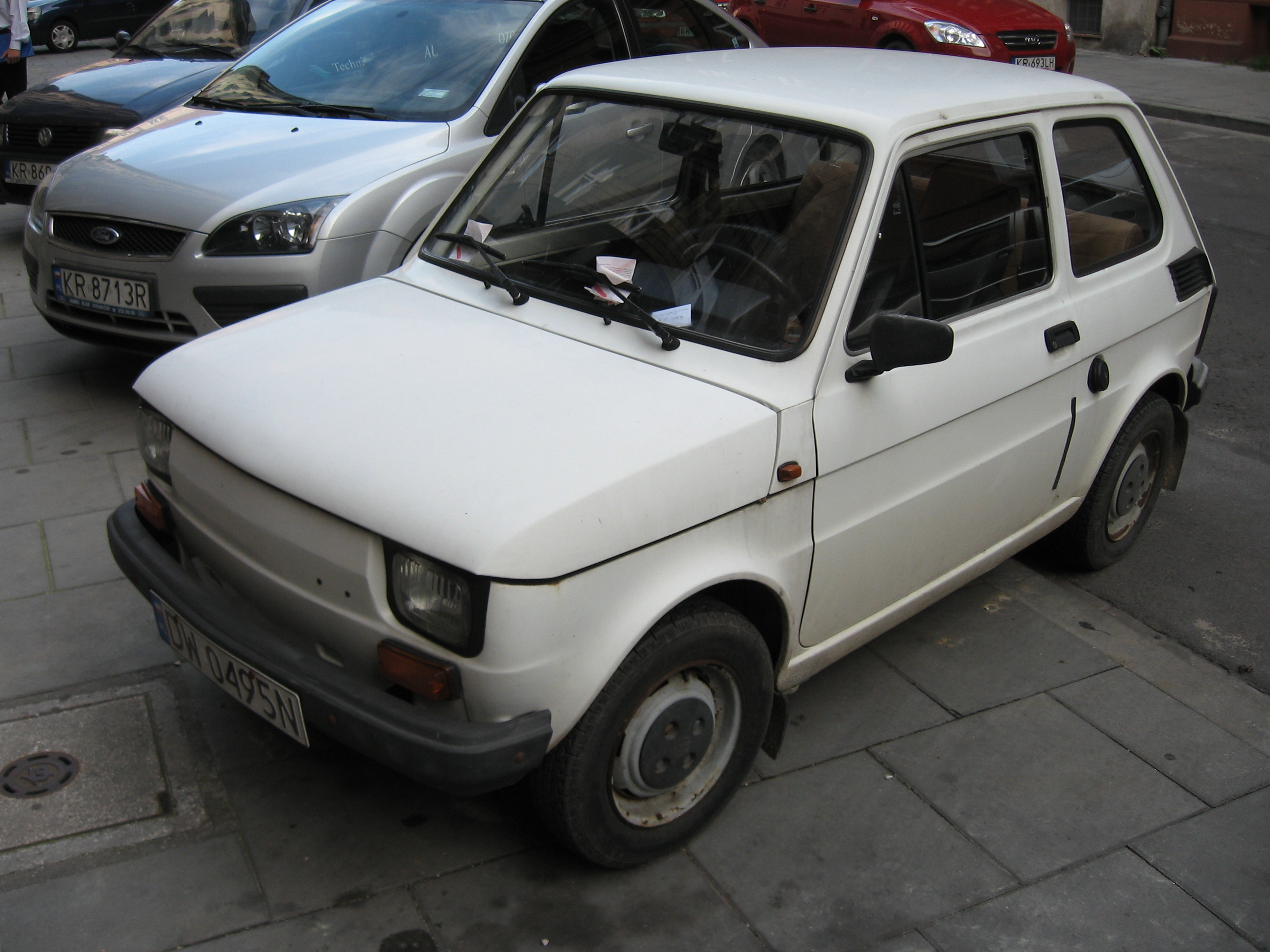 White Polski Fiat 126p 650E in Kraków.